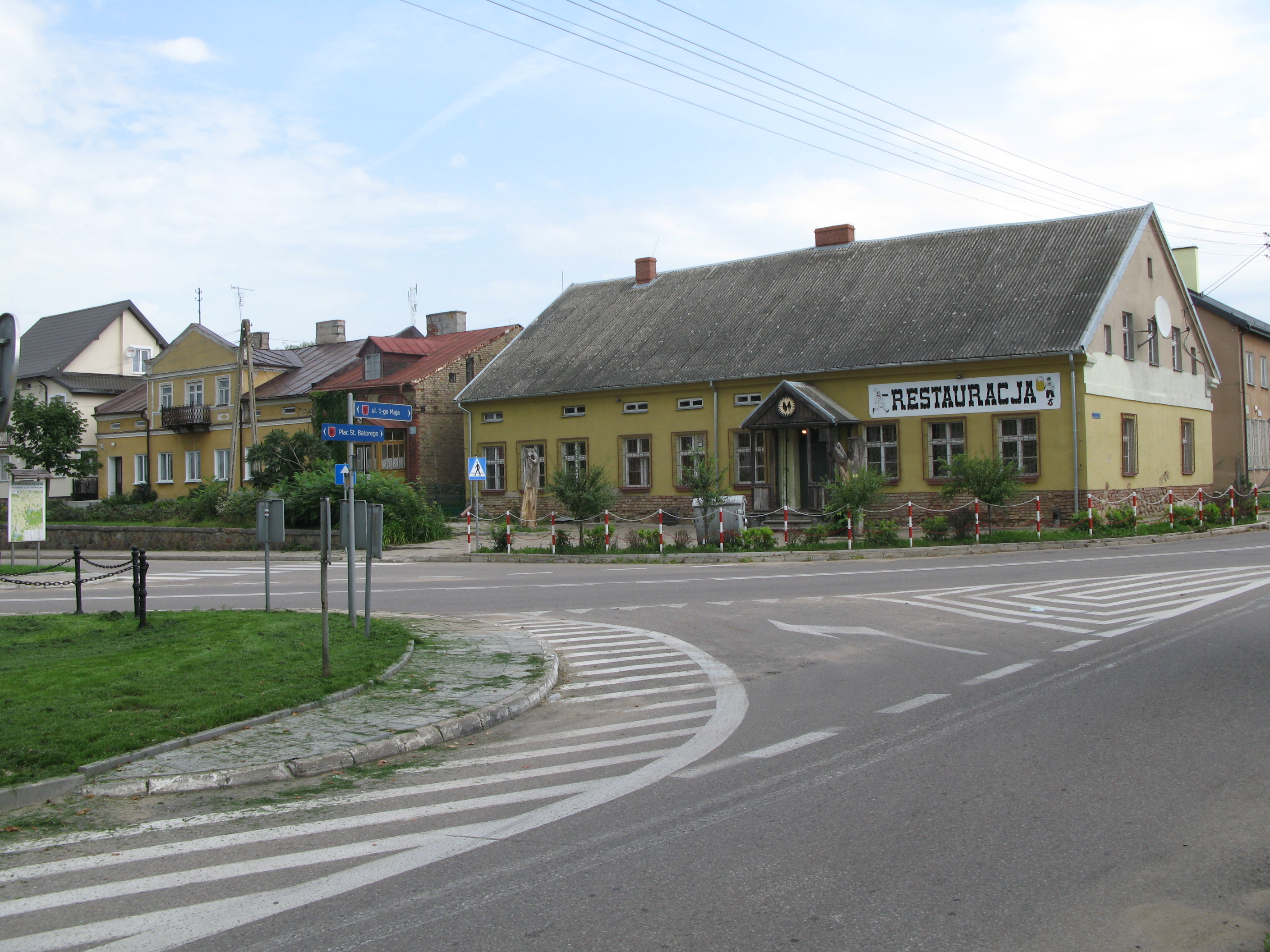 Filipow, Poland, Suwalki region